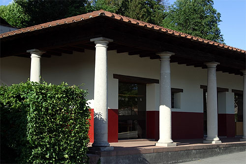 Augst: Augusta Raurica, Römerhaus